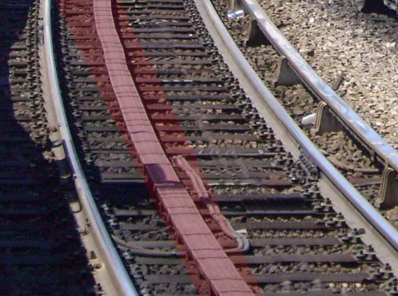 Photo prise par moi même sur le viaduc à proximité de la station Austerlitz à Paris le 29/07/2006